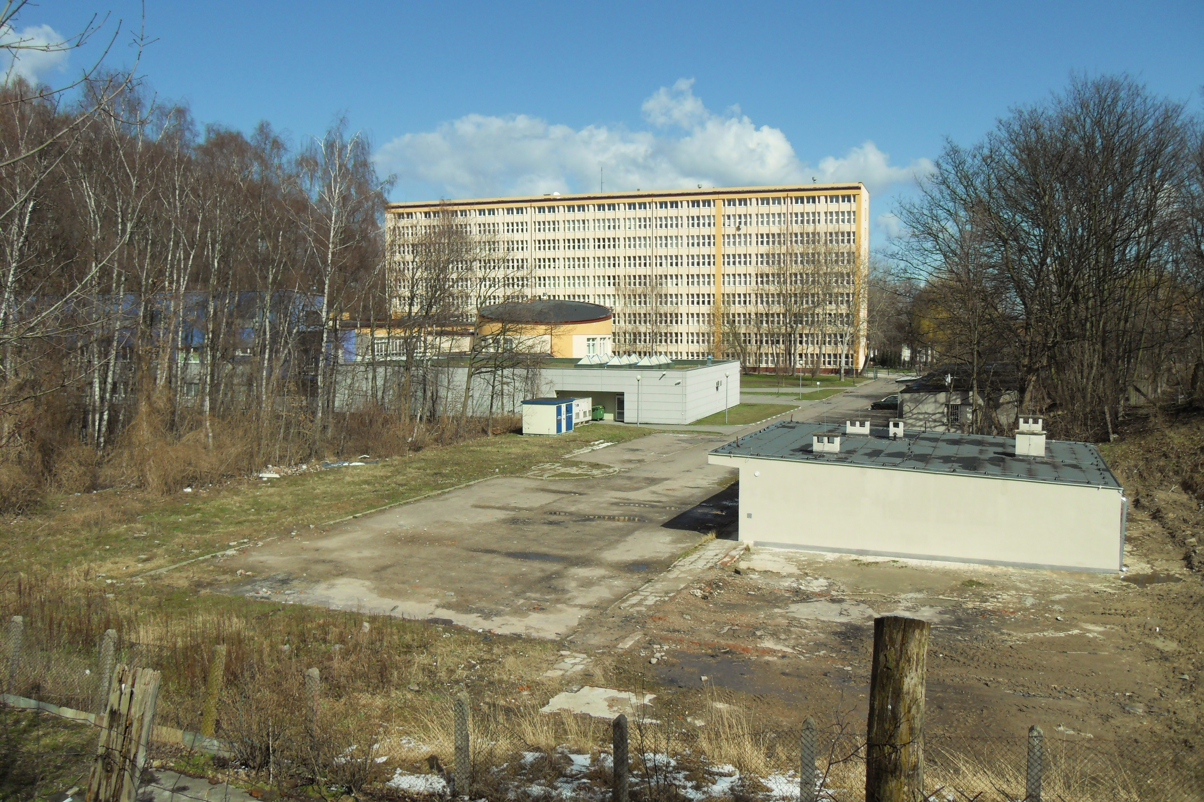 Gdańsk. Suchanińska Cegielnia (Ziegelei Zigankenberg).